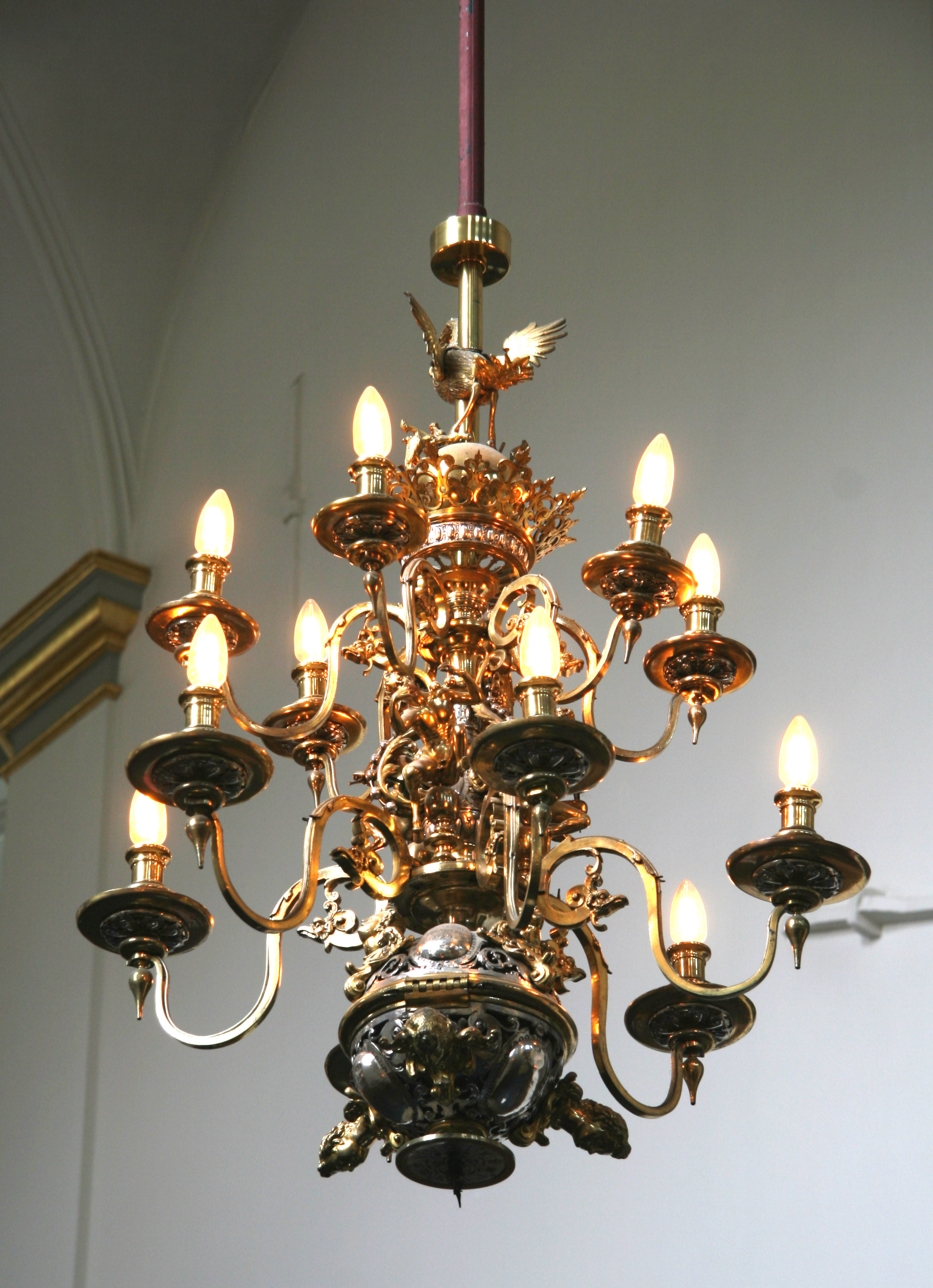 Helligåndskirken, Copenhagen, Denmark. Chandelier in quire.